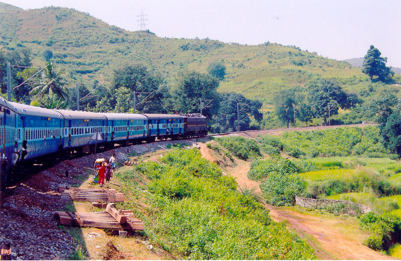 Kirandul express on the way.Rajasekhar1961 (talk) 13:15, 3 June 2016 (UTC)